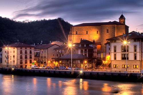 ORIO.EUS